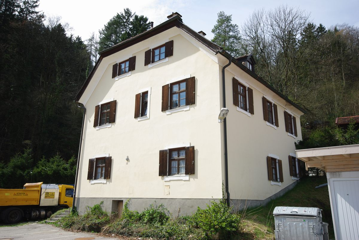 Brunnhaus Thumseestraße 46, 83435 Bad ReichenhallThis is a photograph of an architectural monument.